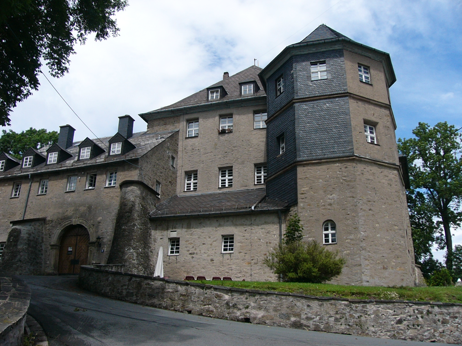 Schauenstein, Frontansicht der Burg